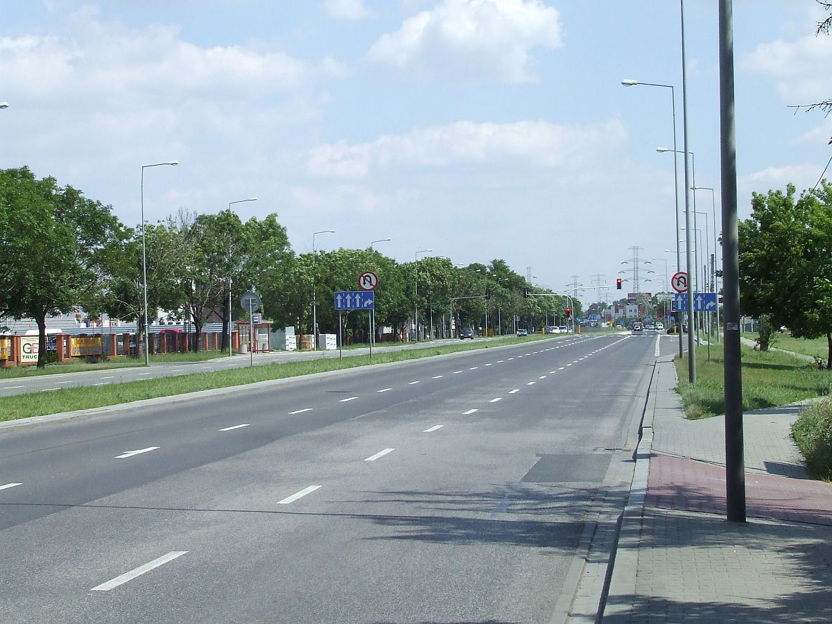 Ulica Połczyńska w Warszawie